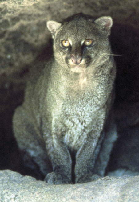 Jaguarundi.